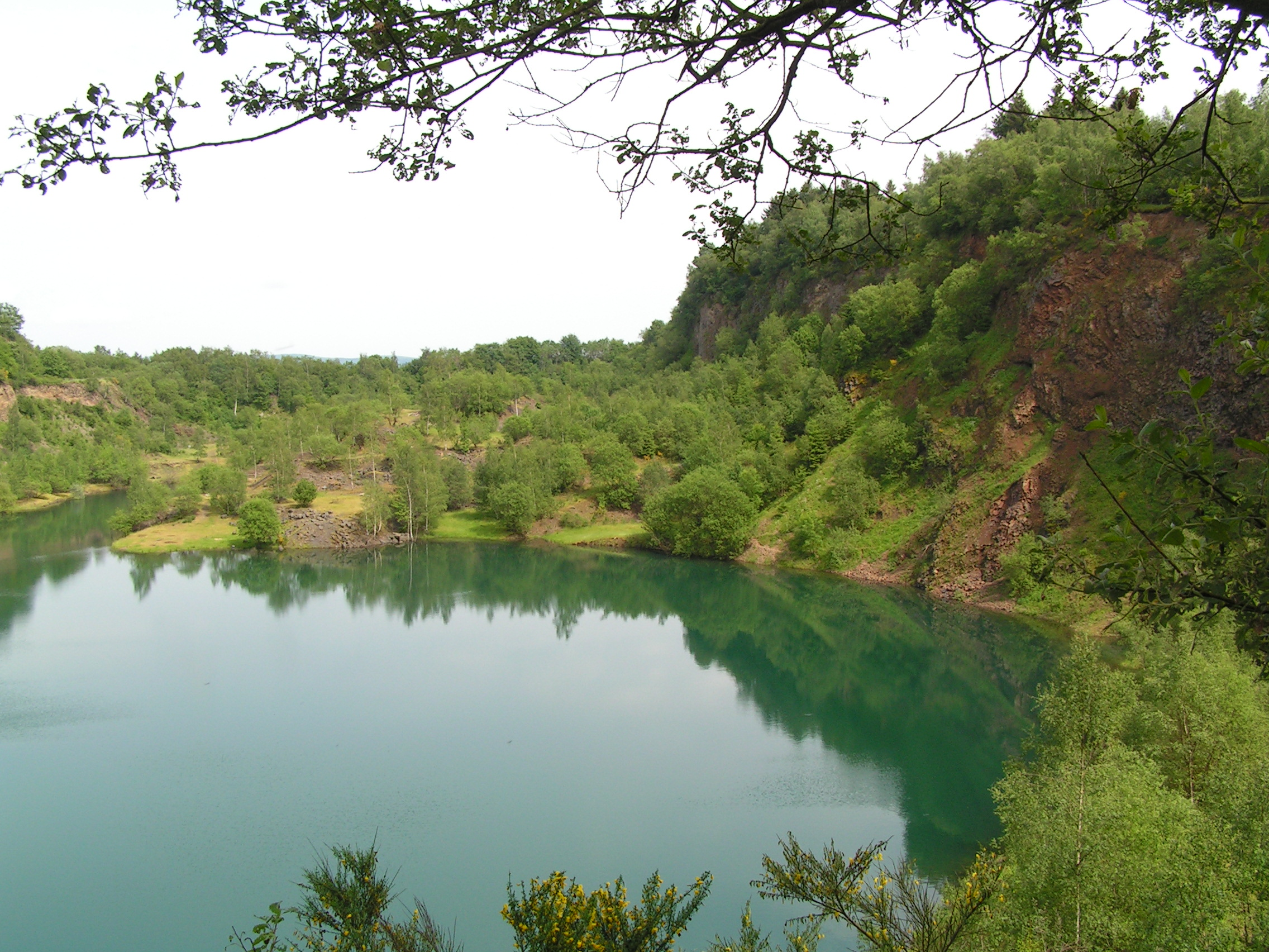 „Silbersee“ im Naturschutzgebiet „Mahlscheid“ (NSG-Name mit „h“ geschrieben) bei Neunkirchen/Herdorf, Deutschland – Mitten durch den Steinbruchsee verläuft die Landesgrenze zwischen Rheinland-Pfalz und Nordrhein-Westfalen, hier ein Blick von Rheinland-Pfalz im Westen nach NRW im Osten.